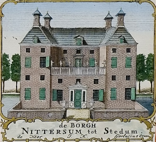 Borg Nittersum in Stedum. Uitsnede uit de kaart van Theodorus Beckeringh uit 1781